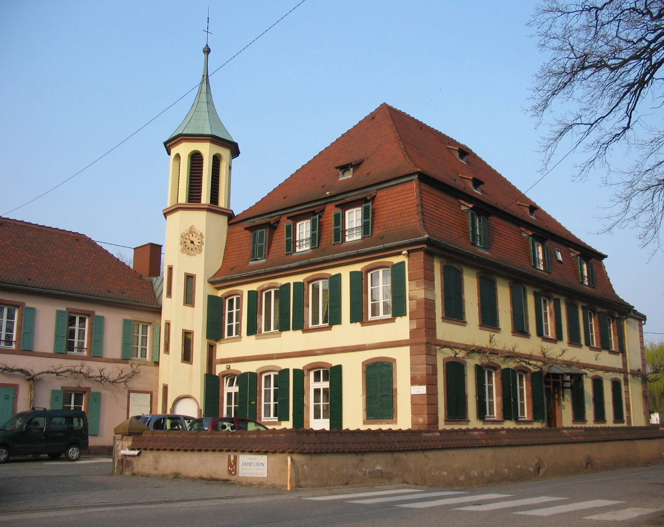 maison de retraite Saint-Léon, de la Congrégation du Saint-Esprit à Wolxheim, dans le Bas-Rhin